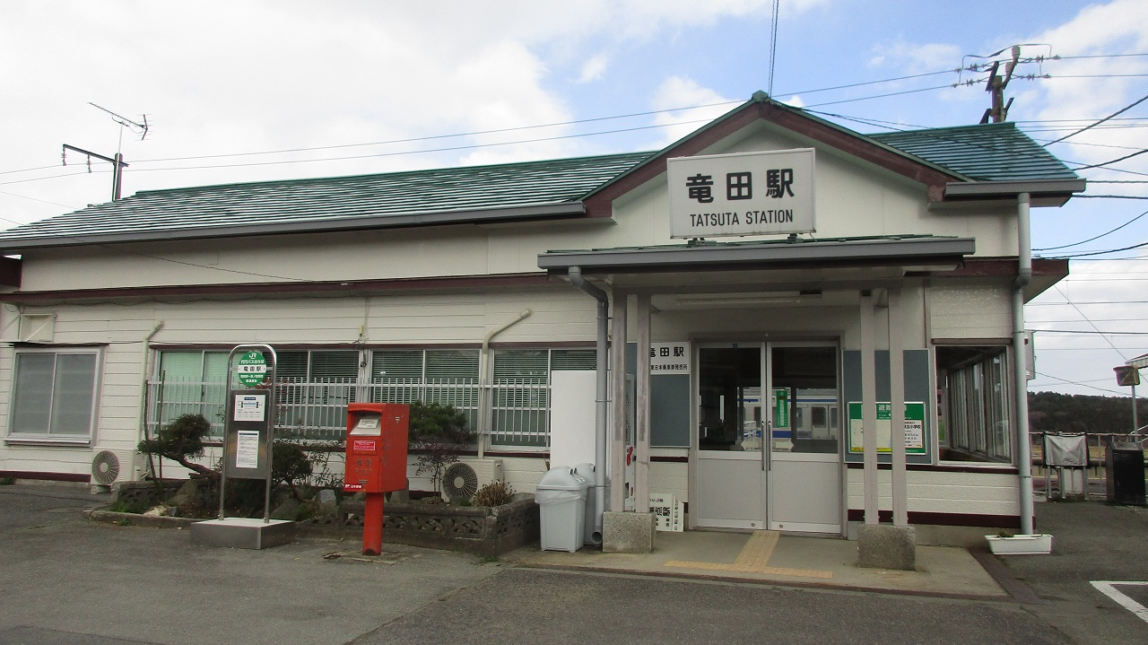 JR常磐線 竜田駅舎